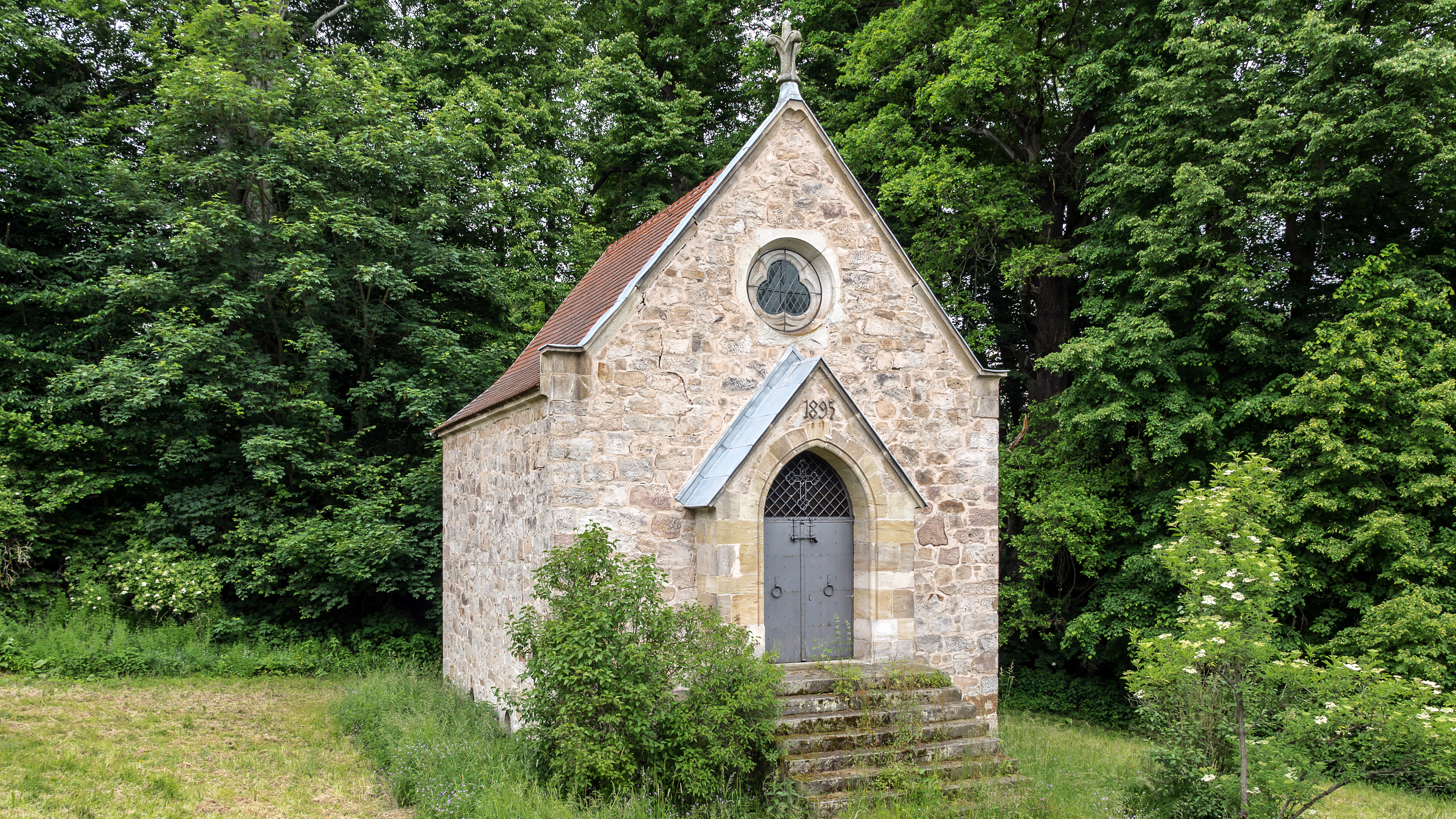 Denkmalgeschützte Gruft der Familie Parry in Kuhfraß, Gemeinde Uhlstädt-Kirchhasel